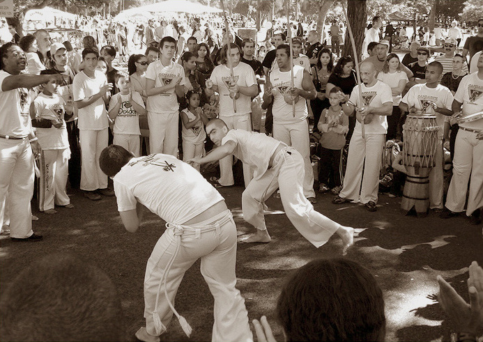 Roda de capoeira no Parque da Redenção, Porto Alegre, Brasil.